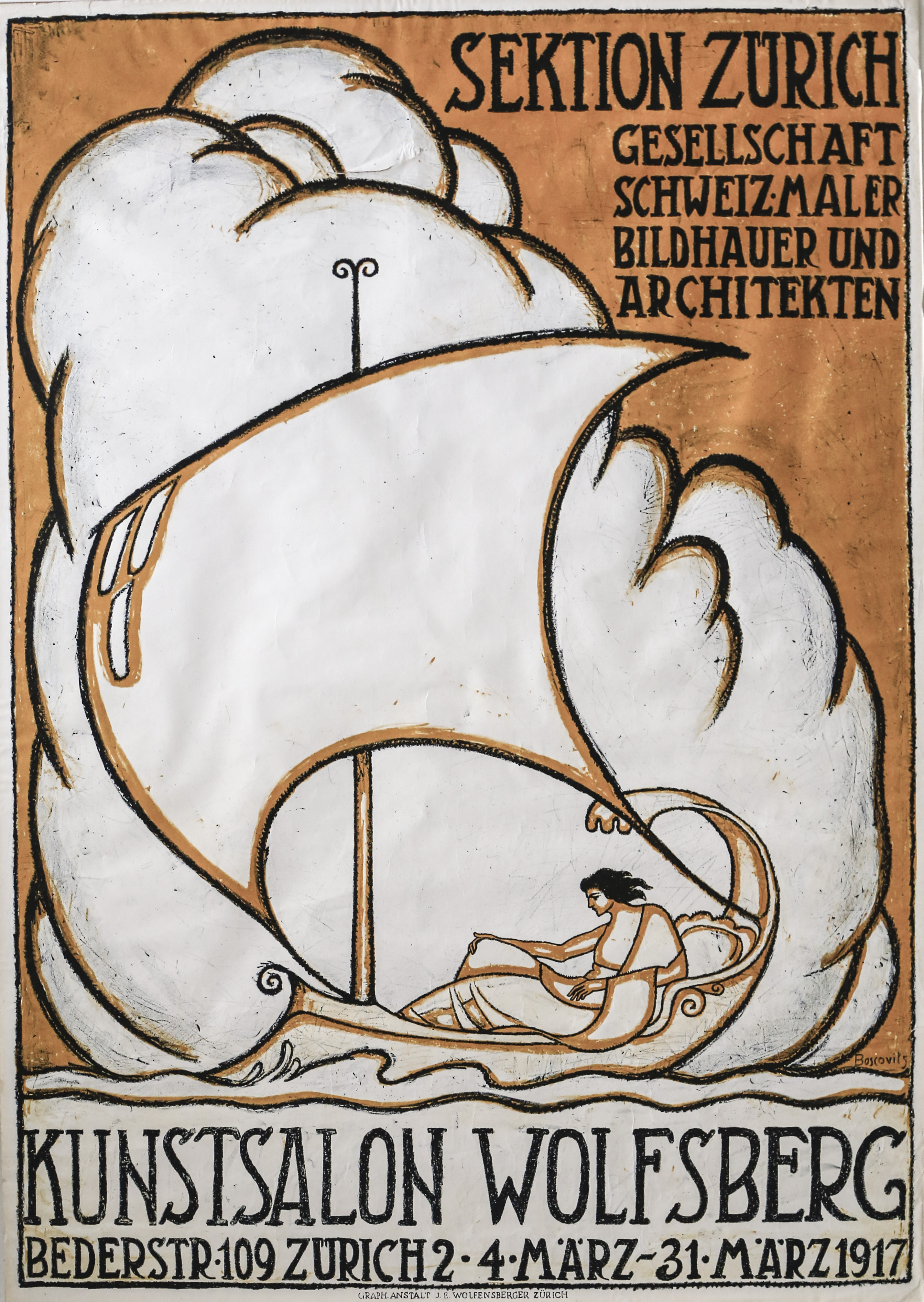 Plakat Lithographie 128x90 cm